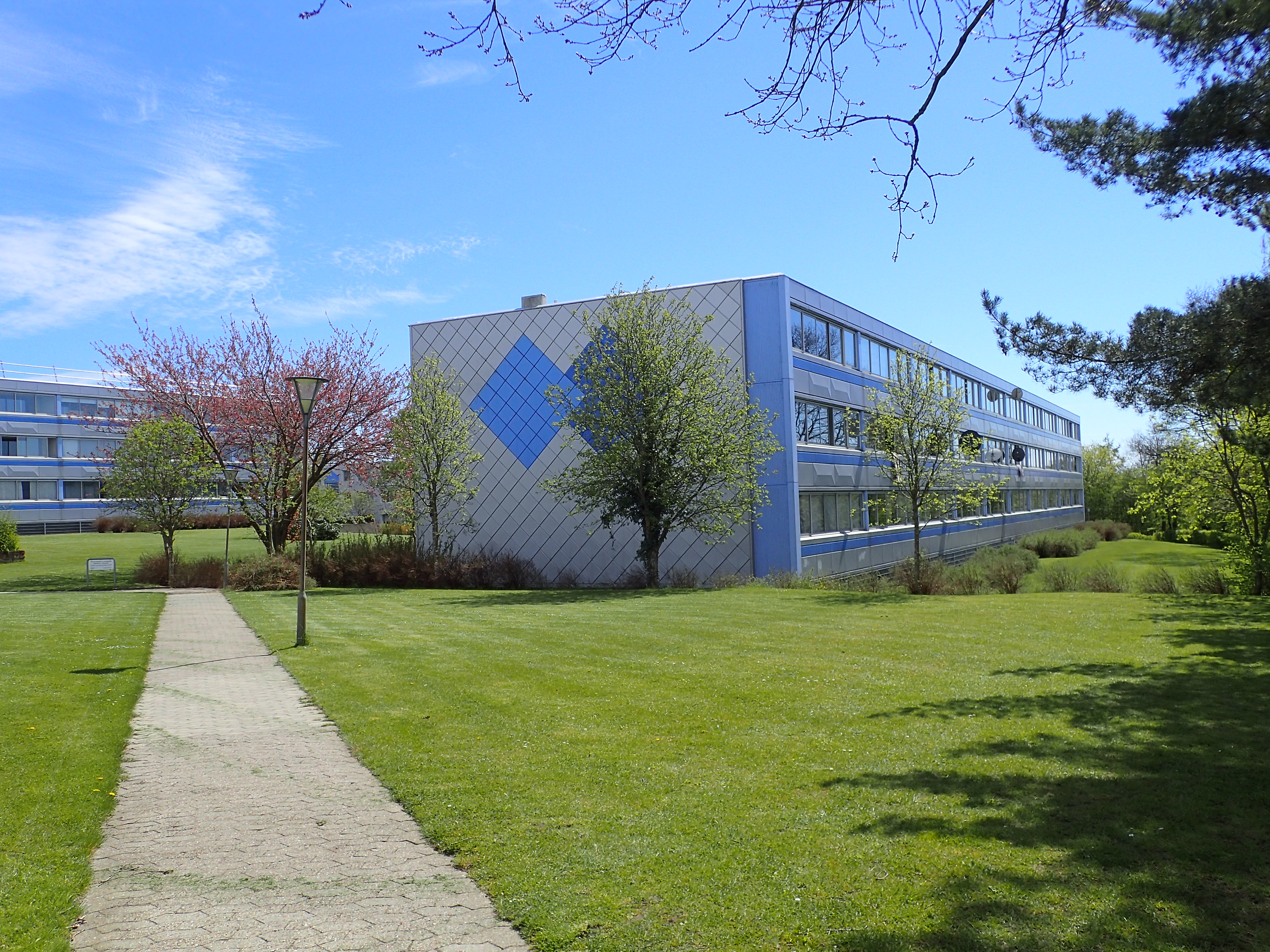 Frydenlund